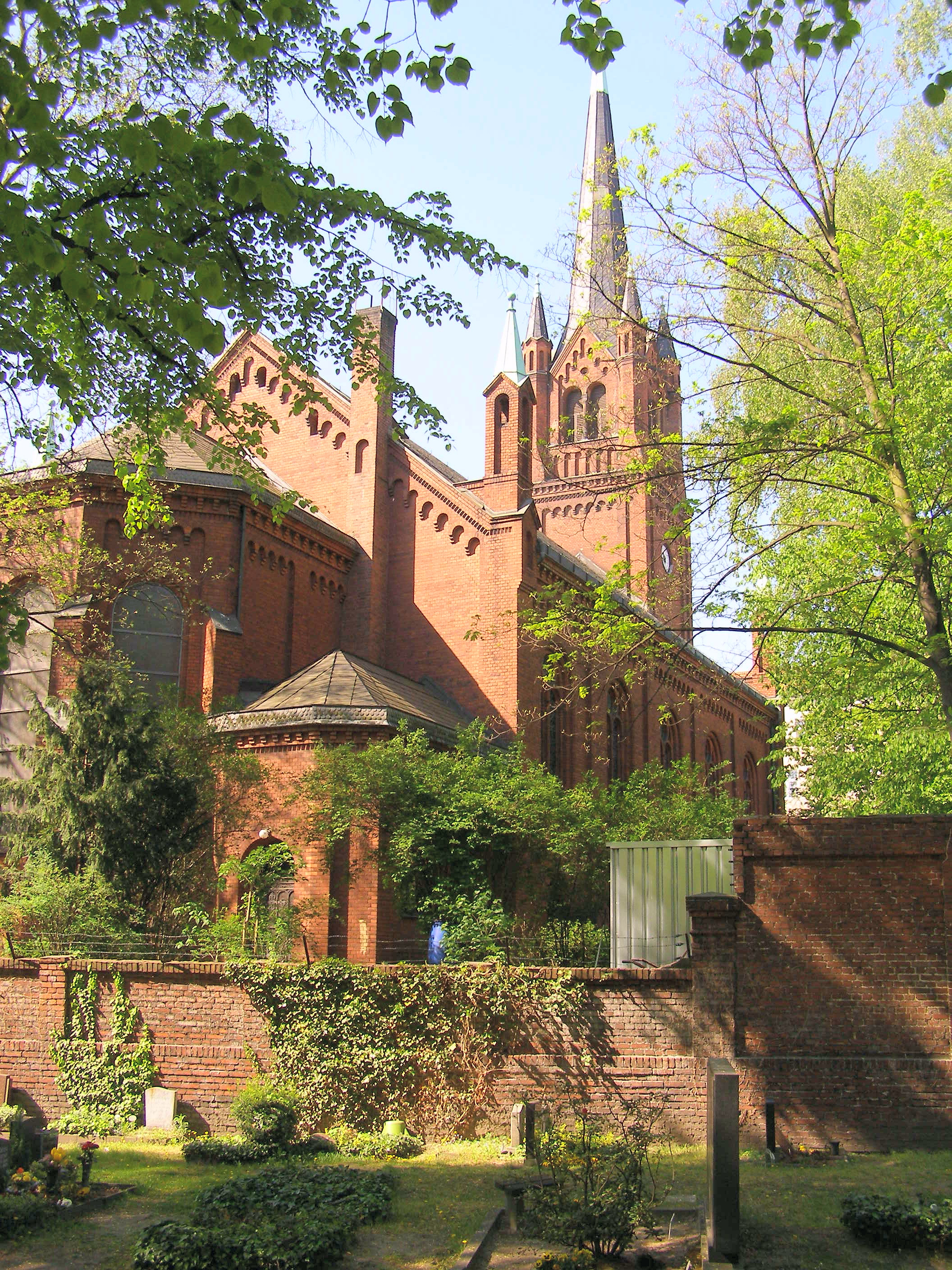 „Böhmisch-Rixdorf“ in Berlin, Magdalenenkirche (vom „Böhmischen Gottesacker“ aus gesehen) „Český Rixdorf“ v Berlíně, Kostel Magdalény (pohled z „Českého hřbitova“) „Bohemian Rixdorf“ in Berlin, Magdalene Curch (view from the „Bohemian Cemetery“)